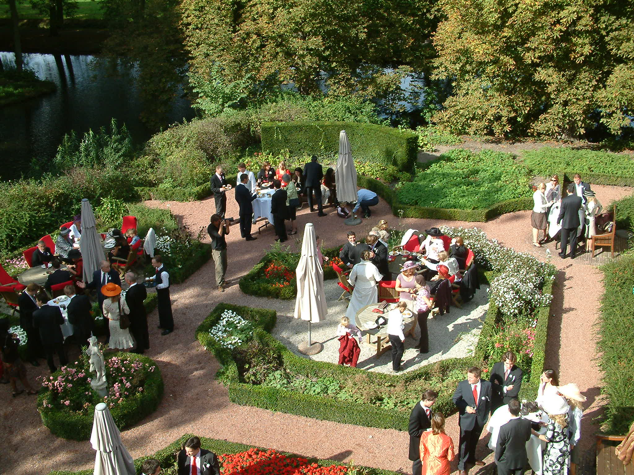 Het kasteel van Rhoon Tuin